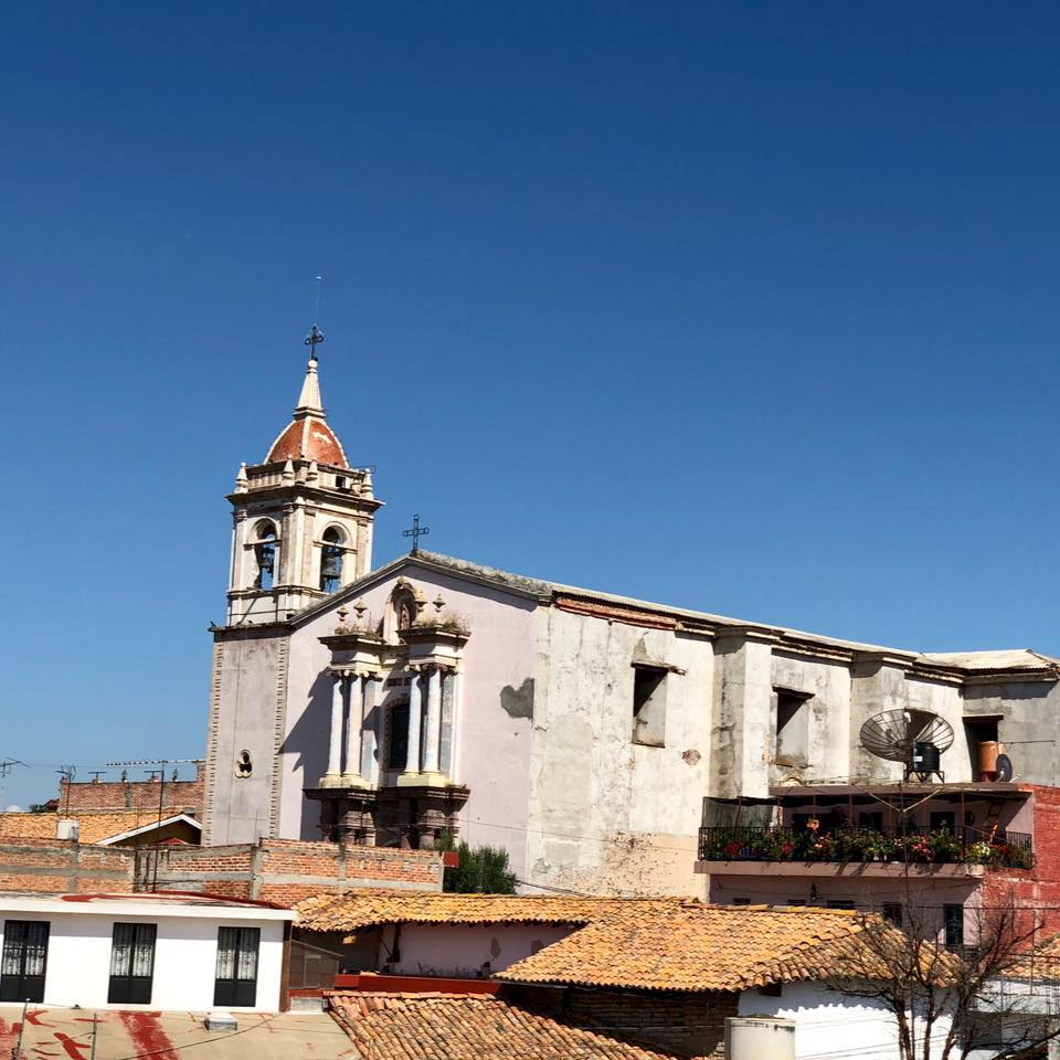 Santuario de Ntra. sra. de Guadalupe Churintzio, Mich.